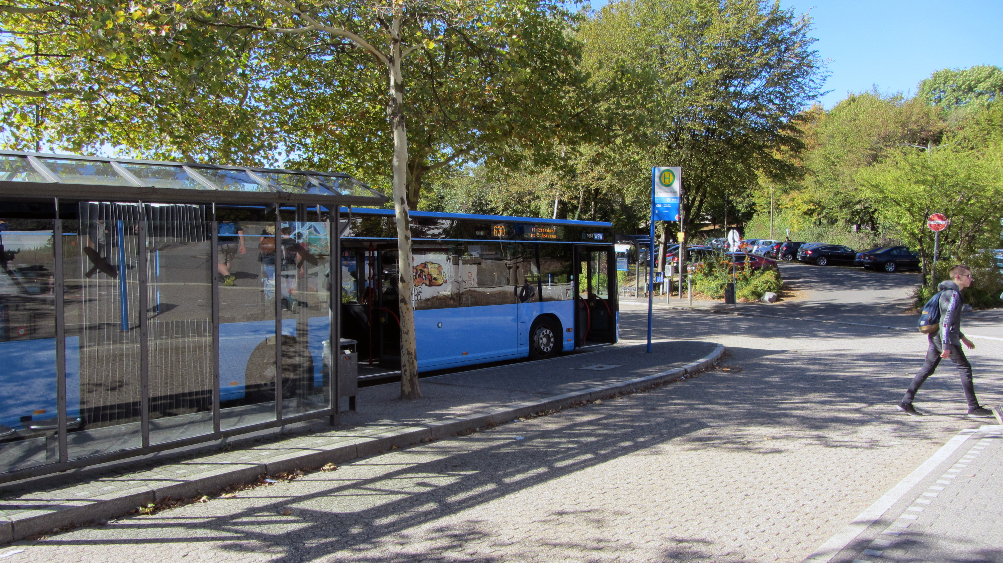 Wuppertaler Stadtwerke - Buslinie 630 - Busbahnhof Schulzentrum Süd